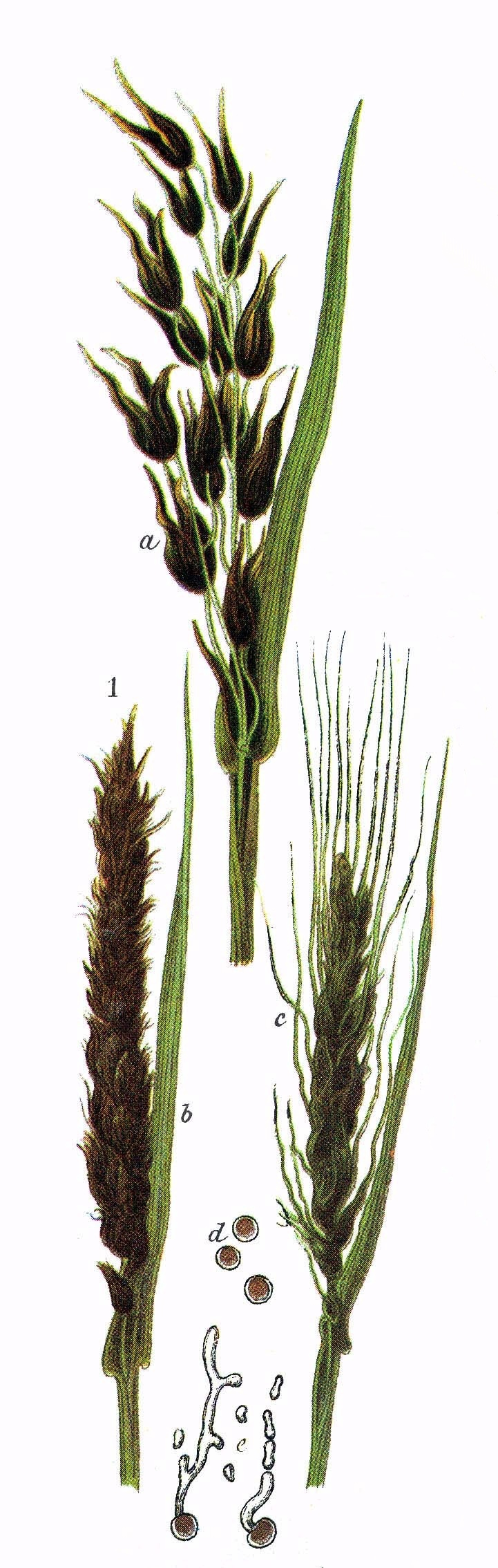 Ustilago: a - Ustilago avenae, b - Ustilago tritici, c - Ustilago hordei, d - teliospore, e - promycelium